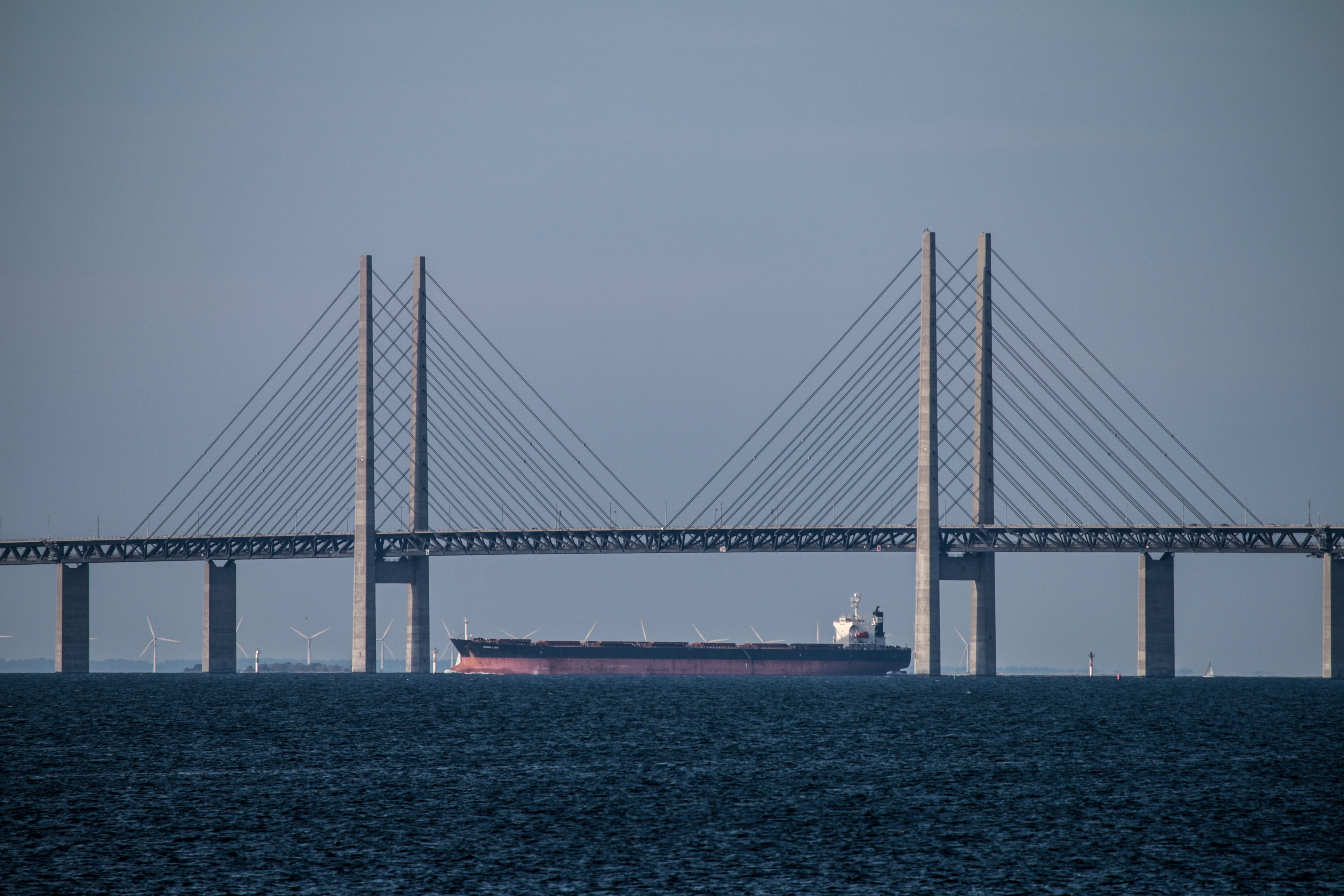 Öresundsbron och tanker